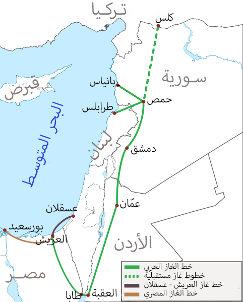 خريطة خط الغاز العربي